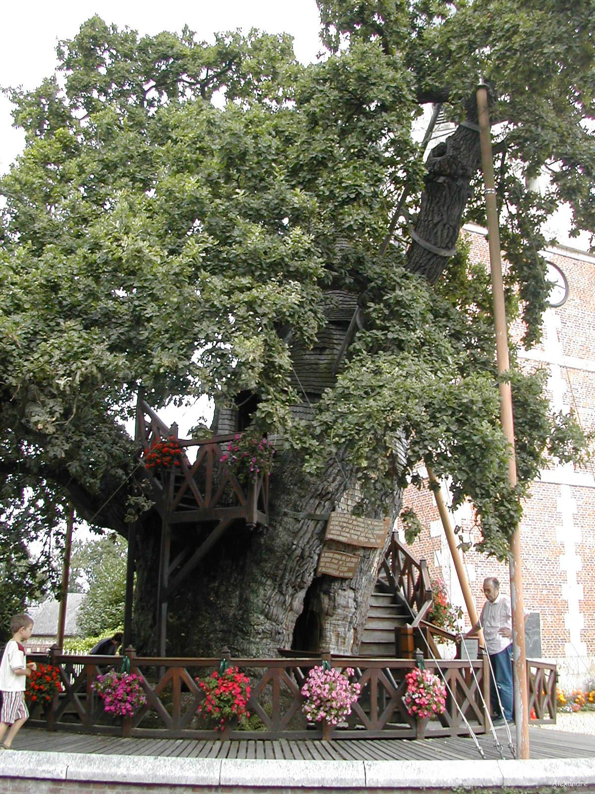 Le chêne d'allouville-belfosse.